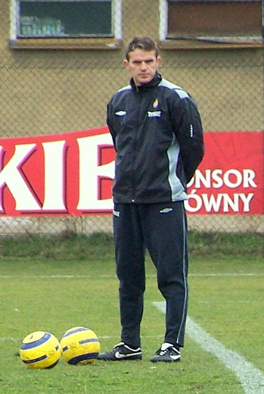 Kazimierz Moskal podczas treningu Wisły w 2007.